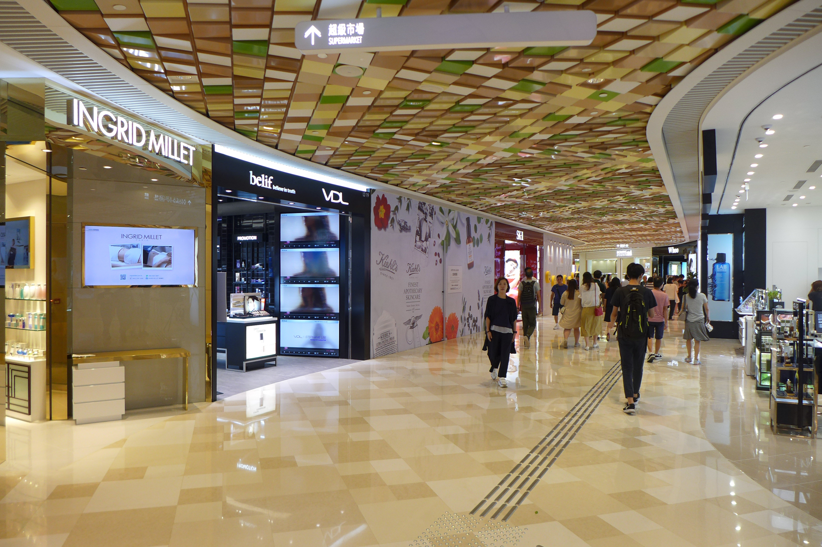 V Walk Beauty Zone